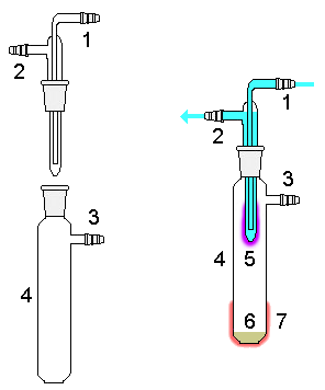 Sublimation apparatus